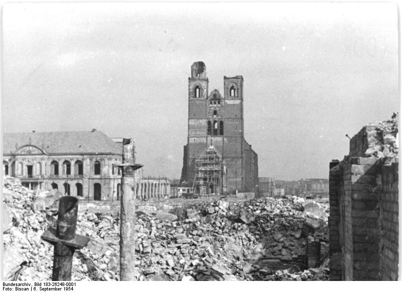 Magdeburg, Johanniskirche, Ruine, Trümmer Zentralbild Biscan 6.9.1954 Das Nationale Aufbauprogramm verwandelt den Stadtkern Magdeburgs Für das Nationale Aufbauwerk Magdeburg bewilligte der Ministerrat 1953 fünfzehrn Millionen DM. In der fats völlig zerbombten Innenstadt wurde mit dem Bau einer grossen Ost-West-Strasse begonnen. Jetzt nach 16 Monaten Bauzeit hat sich das Stadtzentrum grundlegend verwandelt. Die weiten Leerflächen des Zentrums sind verschwunden. Heute stehen hier eine ganze Reihe vier-, fünf- und mehrstöckiger Häuser, die zum Teil schon bezogen sind. UBz: Blick auf die Johannis-Kirche und das Alte Rathaus vor Inangriffnahme des Nationalen Aufbauwerks. (Siehe auch Bild 2N und 3N)